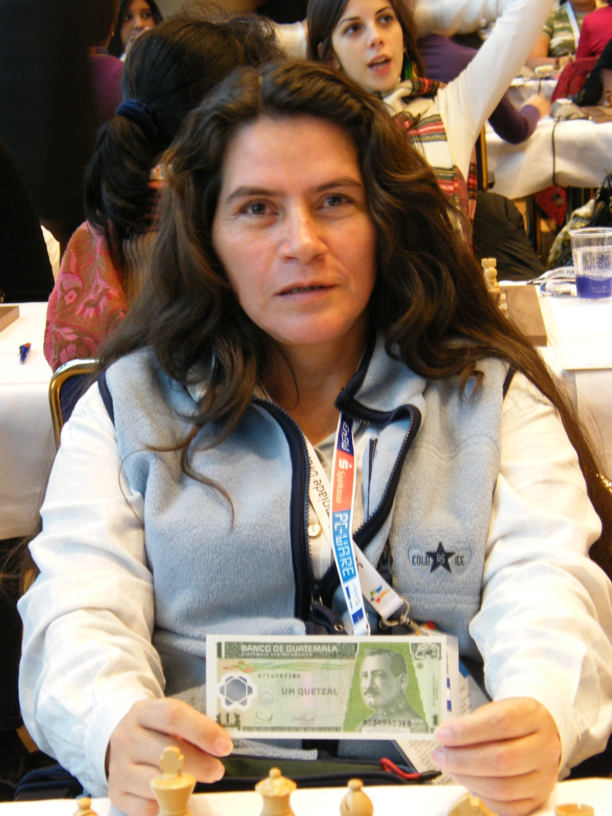 Silvia Carolina Mazariegos bei der 38. Schacholympiade in Dresden 2008